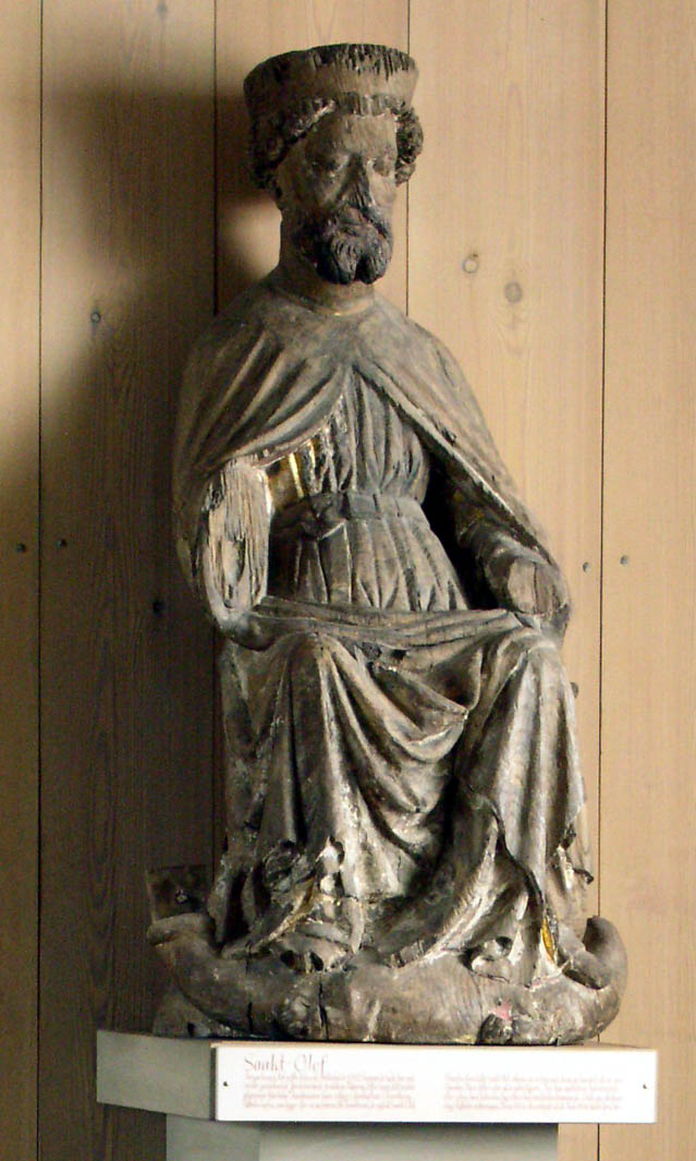 S:t Olof, skulptur, Rättviks kyrka, Dalarna